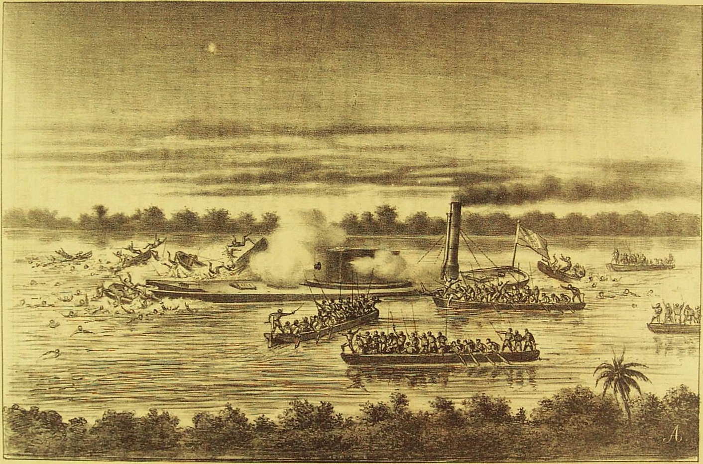 Canoas paraguaias dando abordagem ao monitor Alagoas, nas proximidades das baterias do Timbó.